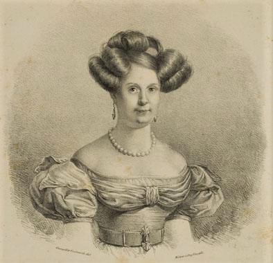 Teresa Carniani Malvezzi, incisione